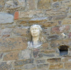 Santa Maria Maggiore church in florence